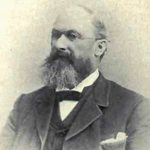 Donald McMillan